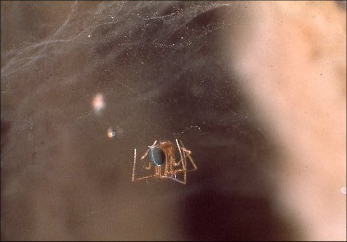 Telema femelle sur le revers de sa toile